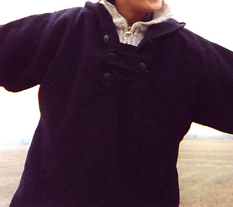 Eine Jungenschaftsjacke, bekannt unter der Abkürzung Juja oder auch Juscha